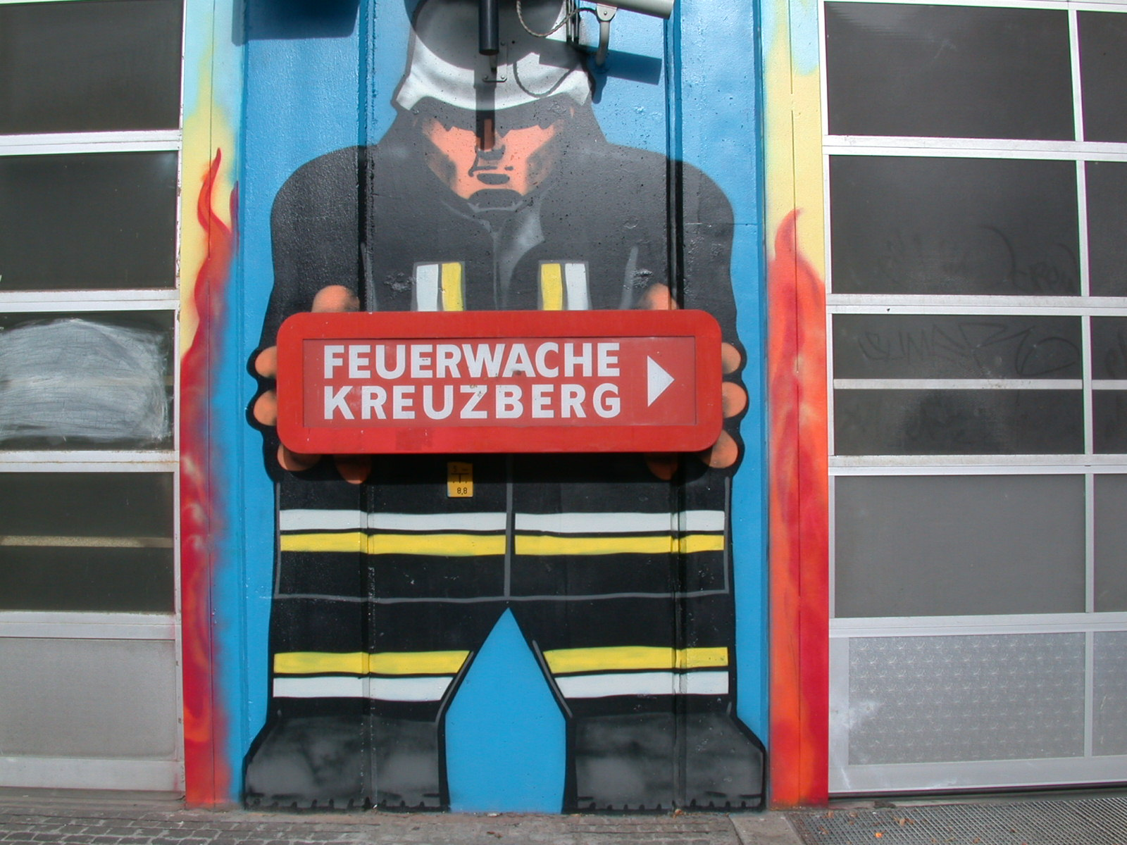 Feuerwache Kreuzberg, Graffiti, Berlin, 2003